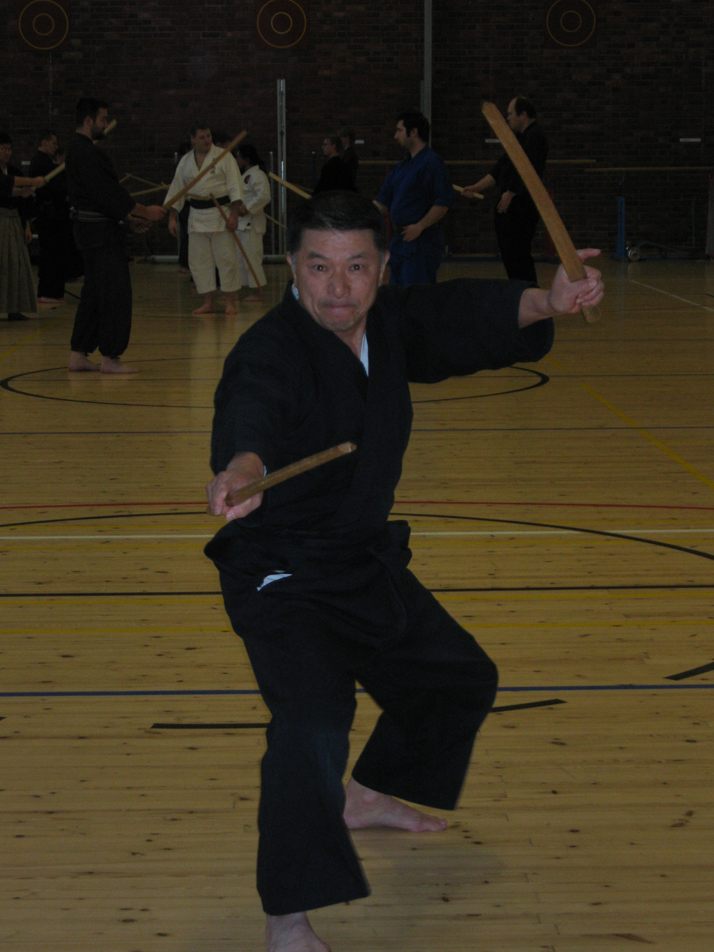 Hyōhō niten ichi-ryū, Koryū kenjutsu in Japan. 11.soke Iwami Toshio Gensho